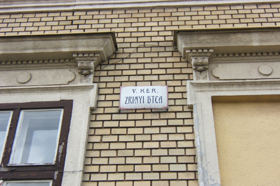 A kaposvári Zrínyi utca régi utcanévtáblája